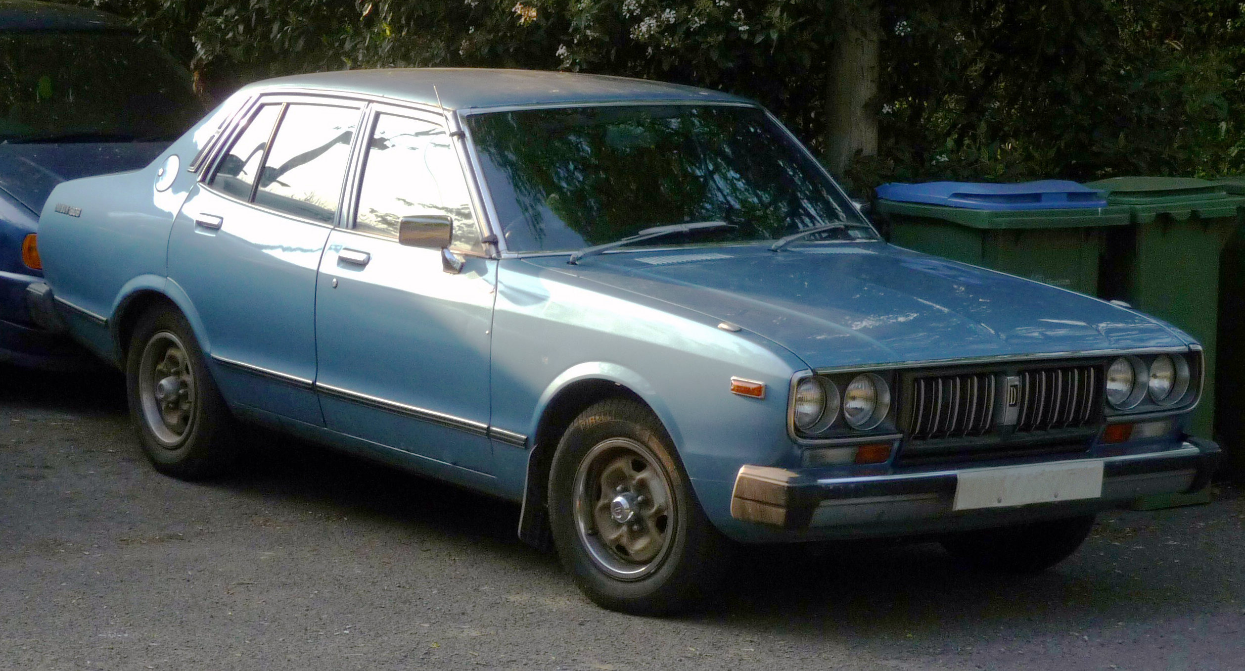 1979 Datsun 180B (810-series Bluebird)